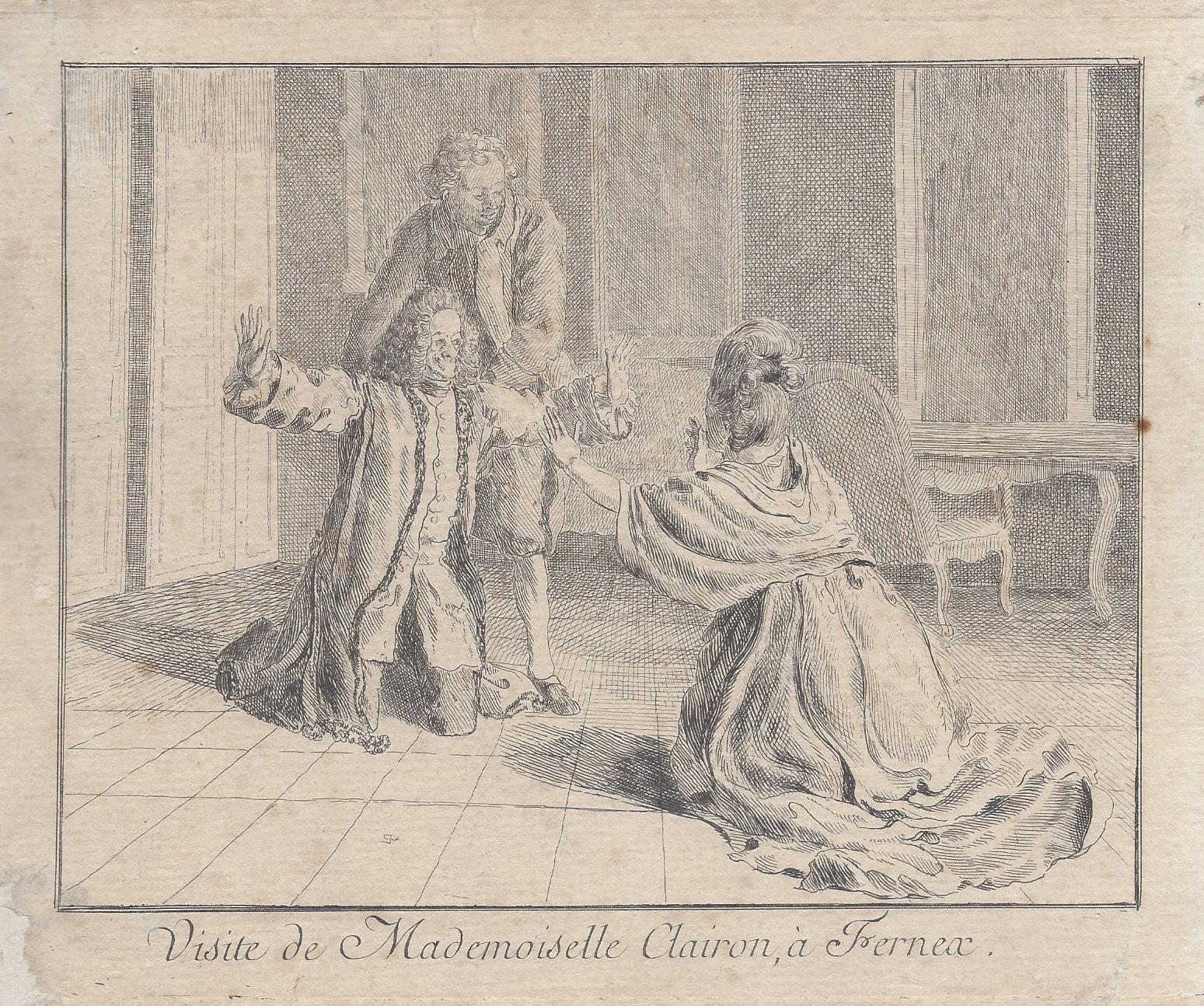 Visite de Mademoiselle Clairon, à Fernex. Radierung von Jean Huber (1721-1786), Voltaire empfängt Hyppolyte Clairon, die im Juli 1763 in seinem Privattheater die Zaire gibt.